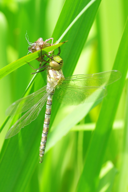 Żagnica sina (Aeshna cyanea) - przeobrażenie. Całkowicie przeobrażona ważka rozkłada skrzydła i odlatuje.